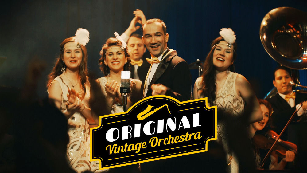 Original Vintage Orchestra